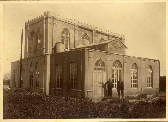 מפעל ההשקאה פלשתינה, הירקון. בית הבטון עומד על תילו. בתמונה עומדים שיפריס וסימקין על רקע הבנין. הערת חן שיפריס: לדעתו במקום סימקין עומד וילבושביץ.